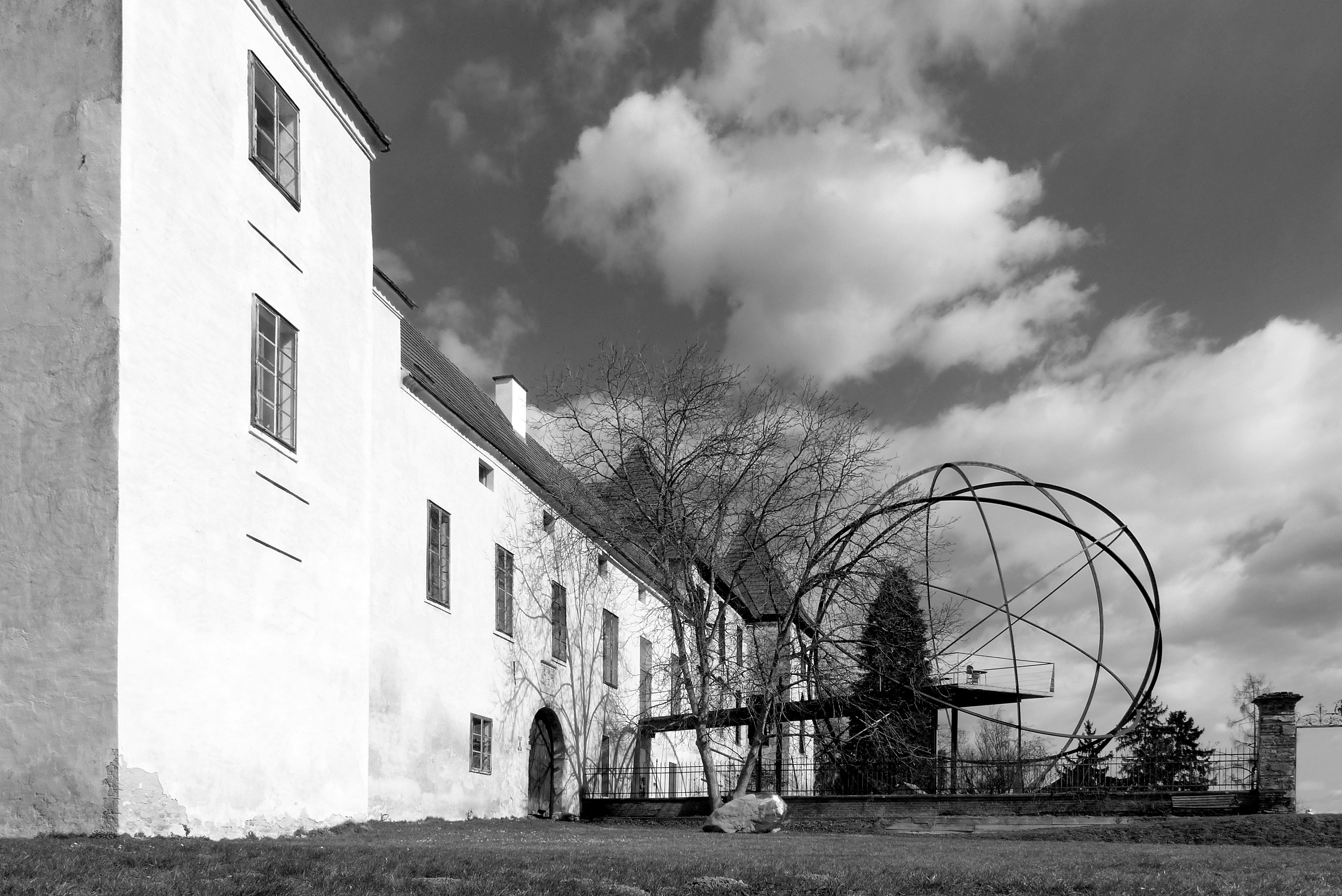 Schloss Kalsdorf bei Ilz (Österreich) mit ‚Sphäre‘ von Hartmut Skerbisch